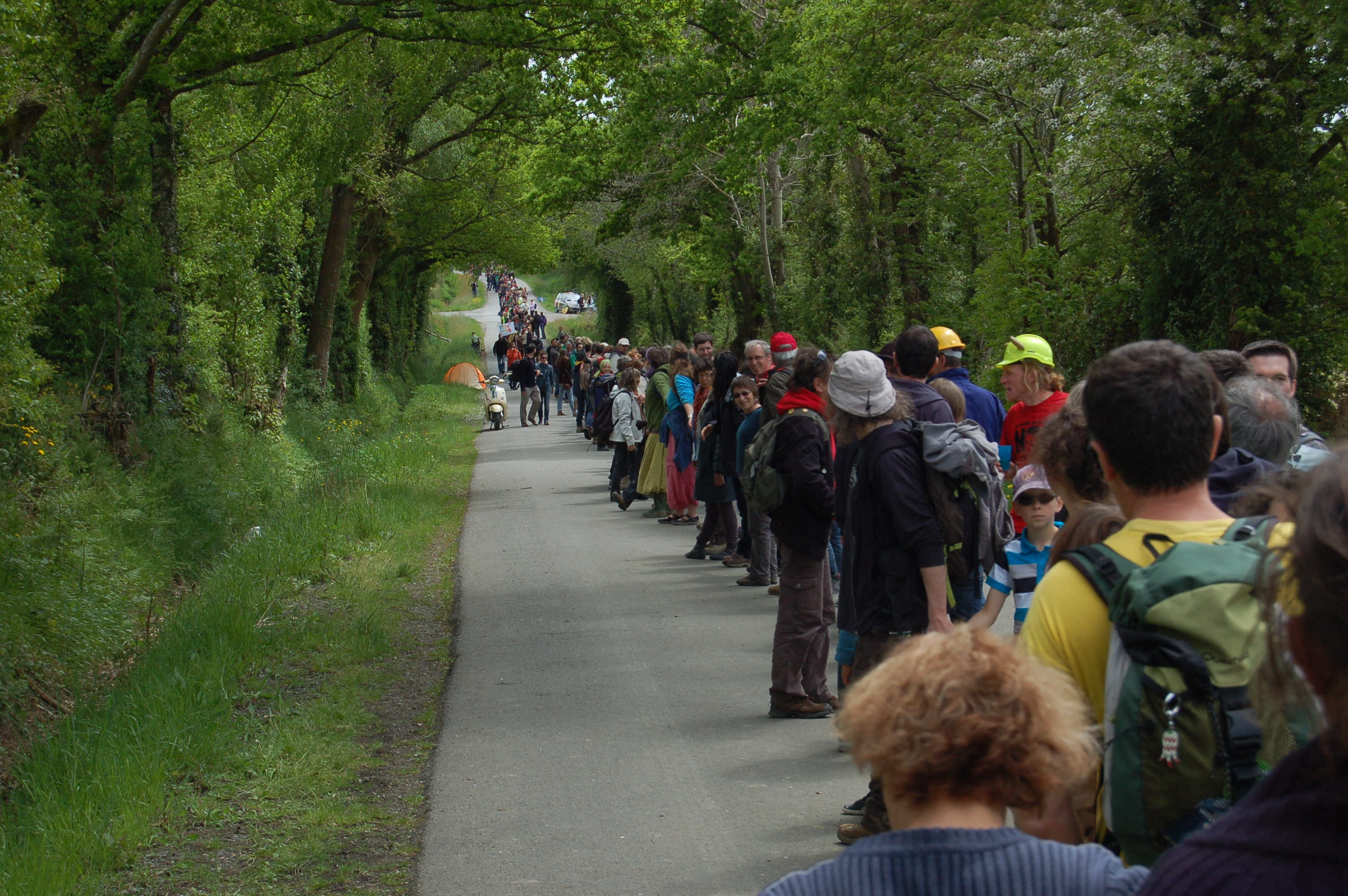 À 14 heures environ, le 11 mai 2013, sur une des routes entourant la zone d'aménagement différé (ZAD) de Notre-Dame-des-Landes : chaîne humaine contre le projet d'aéroport du Grand Ouest.